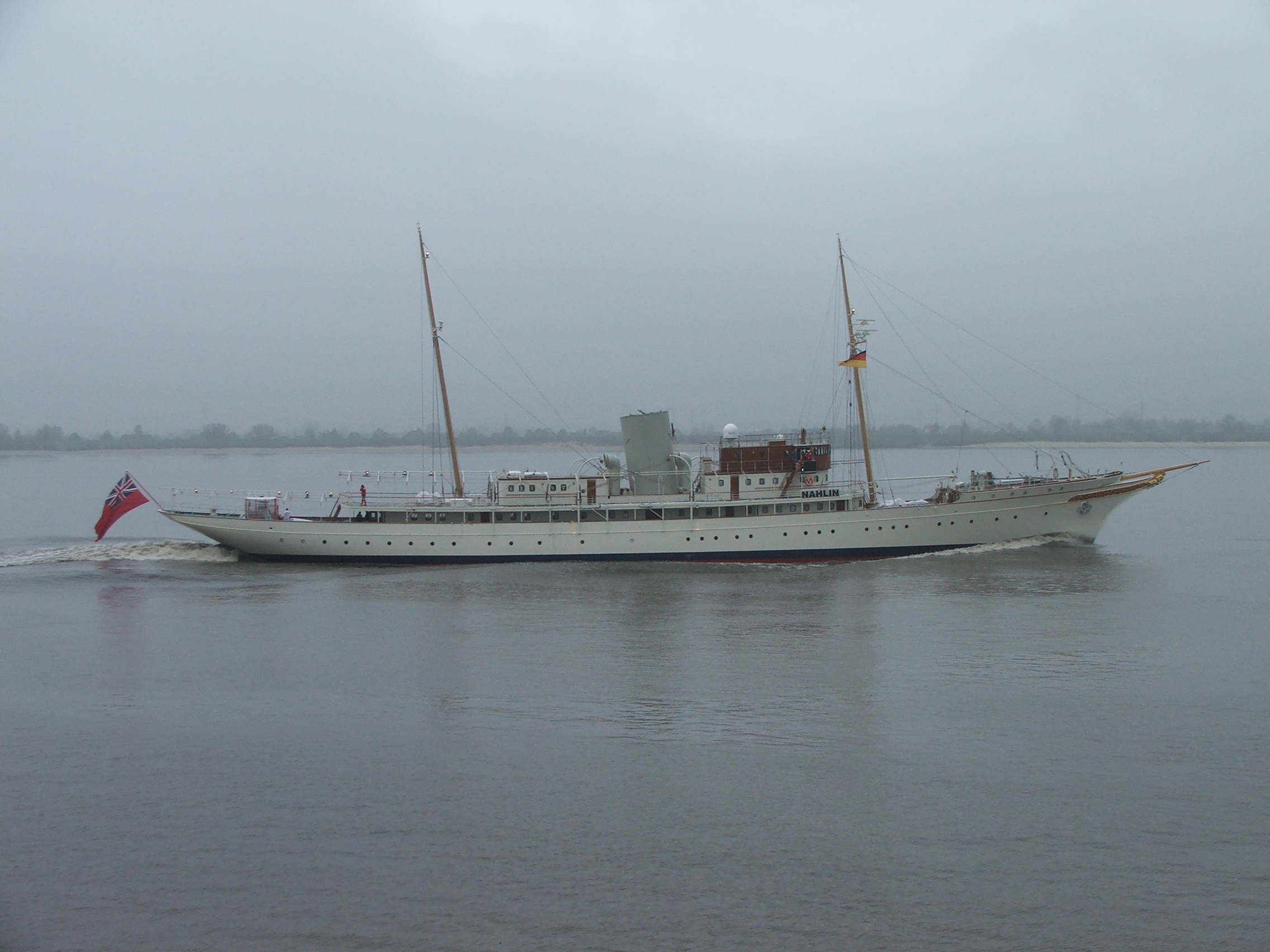 Restaurierte Yacht Nahlin auf Werftprobefahrt